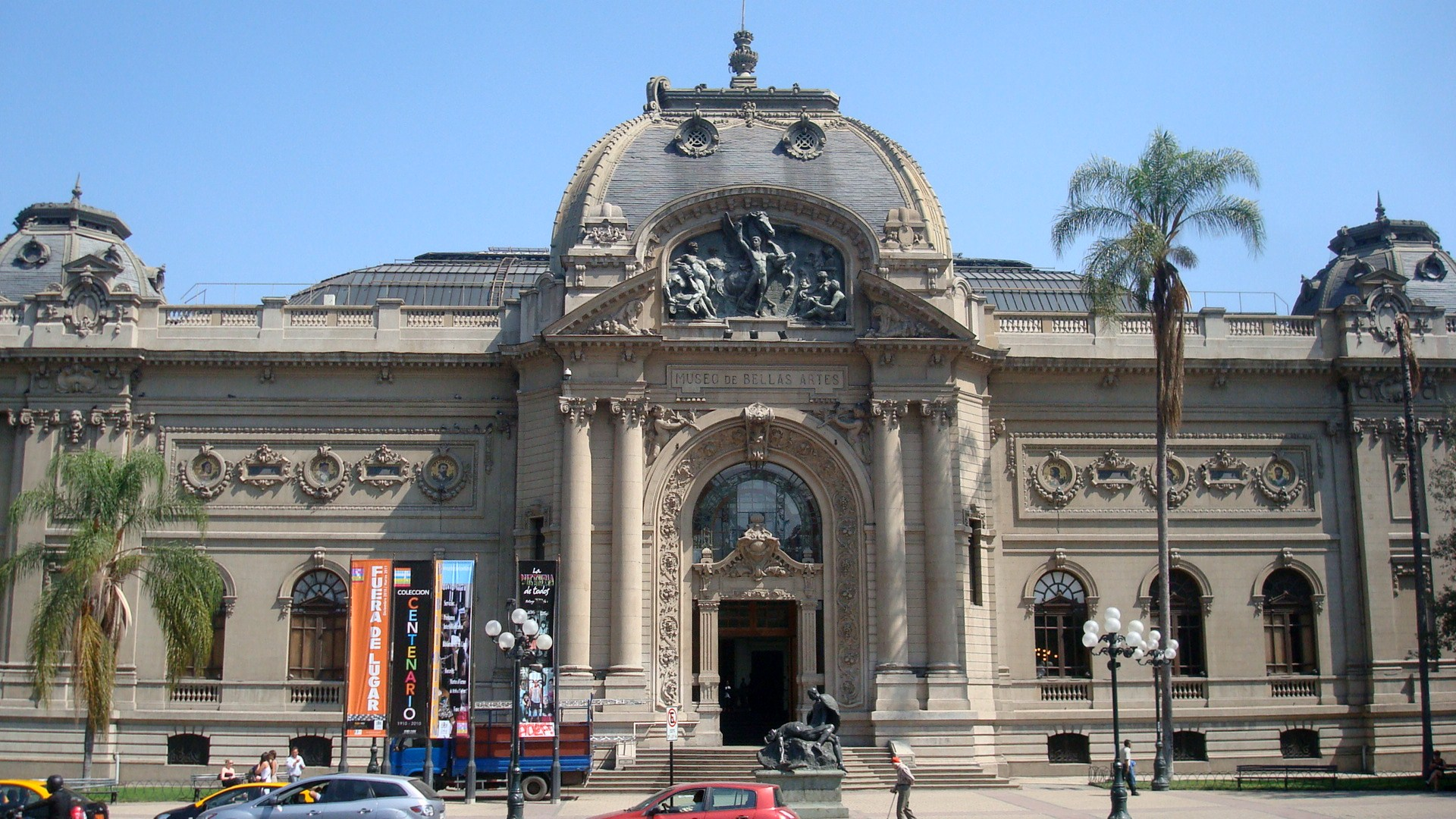 Museo Nacional de Bellas Artes, Santiago Centro, Chile